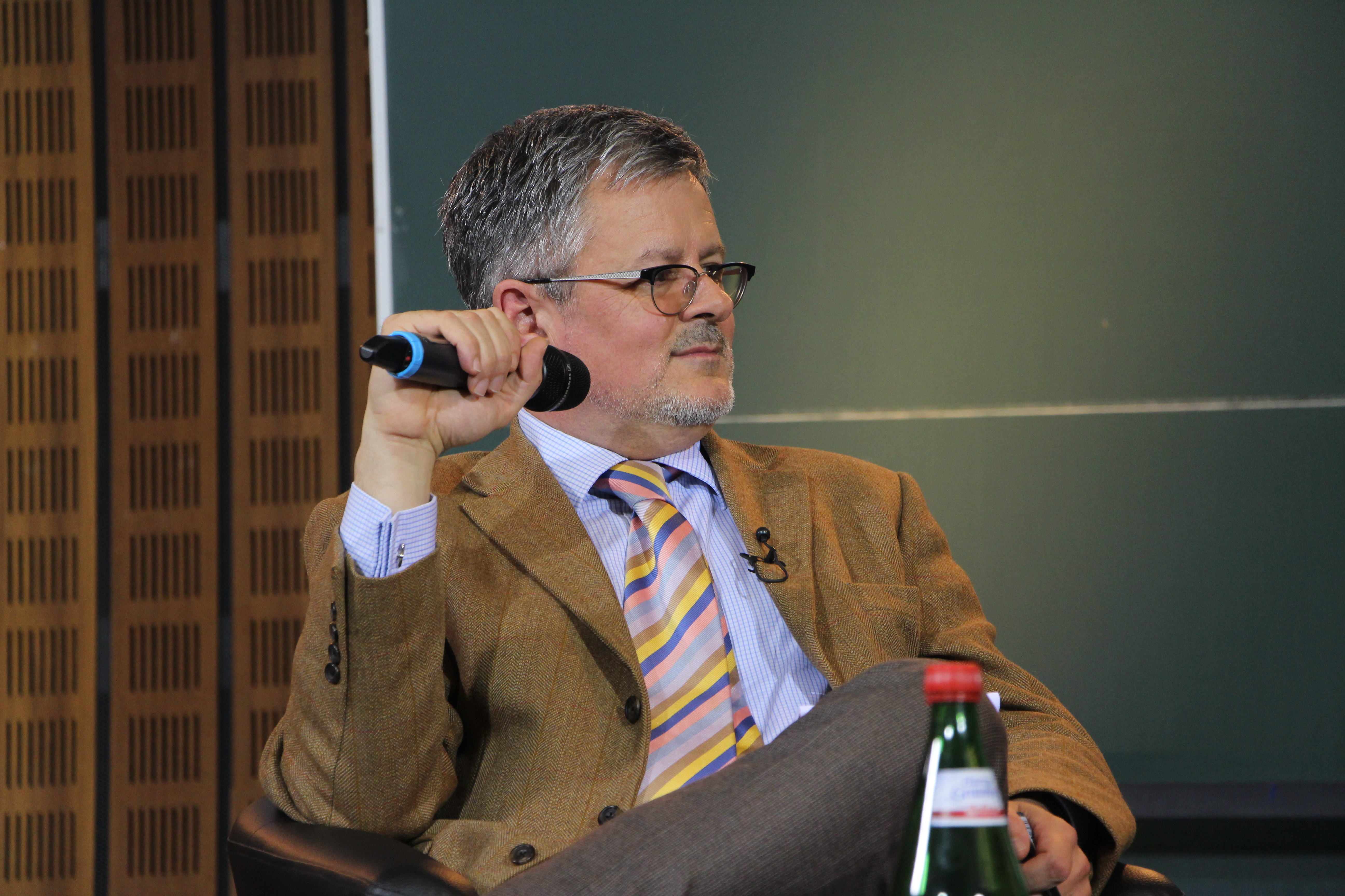 Historikertag 2014 in Göttingen.